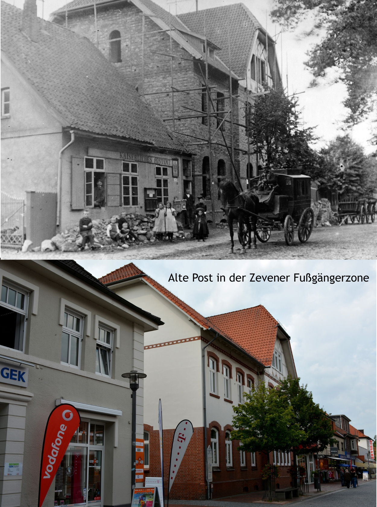 Alte Post Fußgängerzone in Zeven